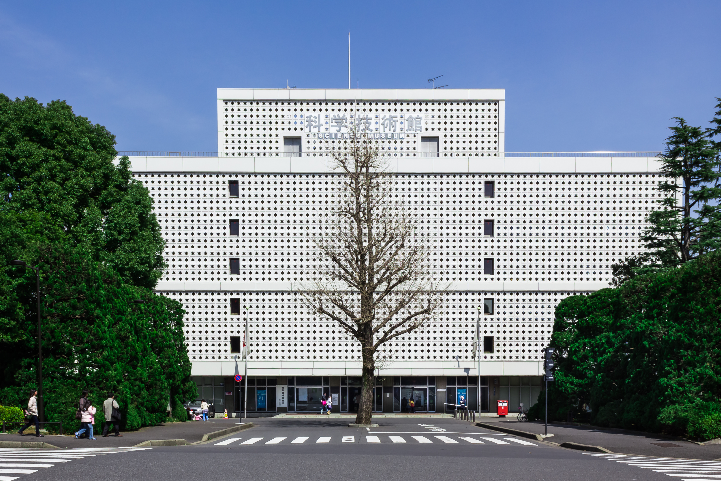 科学技術館（北の丸公園、東京都千代田区）